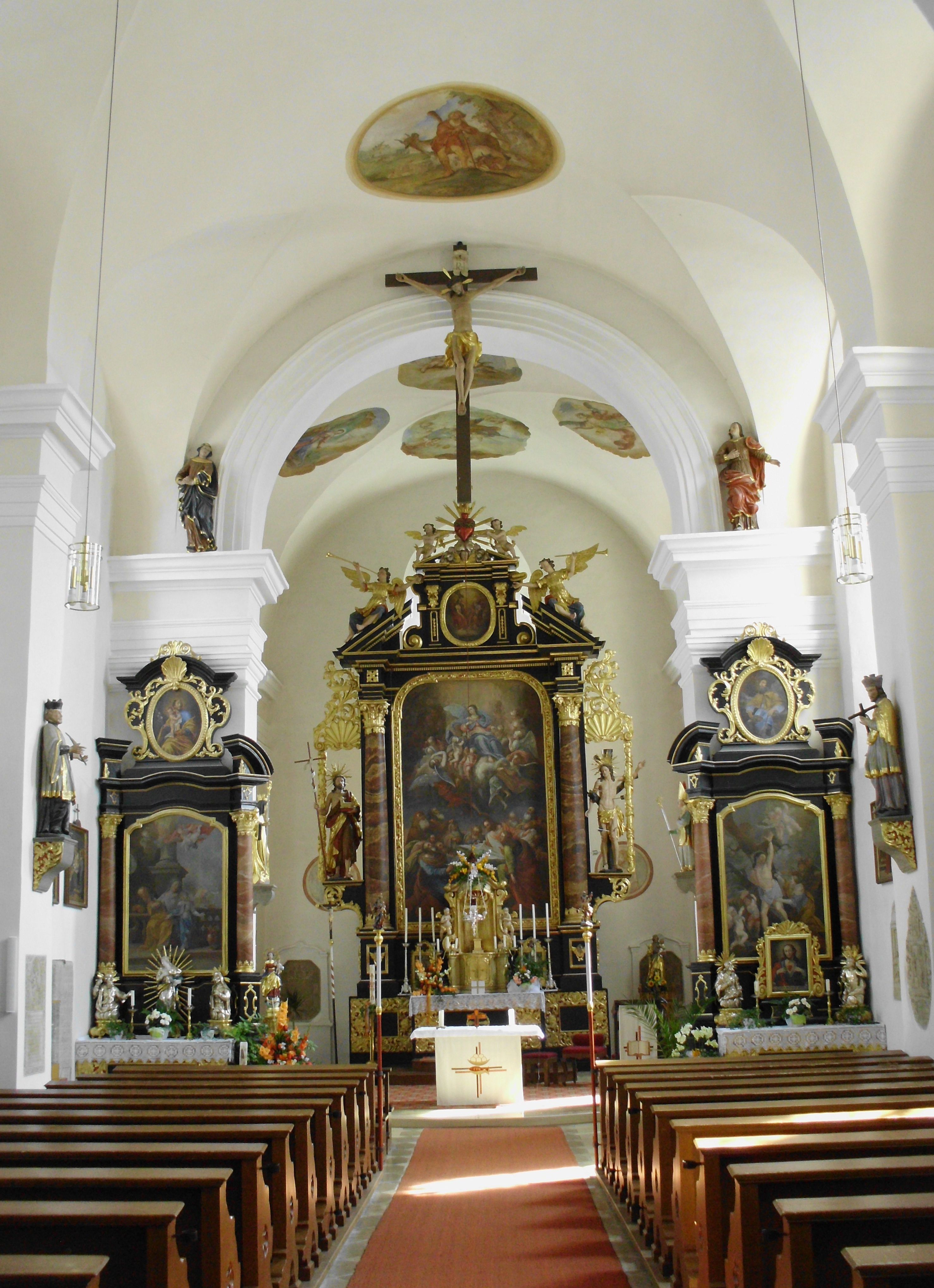 Obermässing, Gemeindeteil von Greding im mittelfränkischen Landkreis Roth, Katholische Pfarrkirche "Mariä Himmelfahrt"